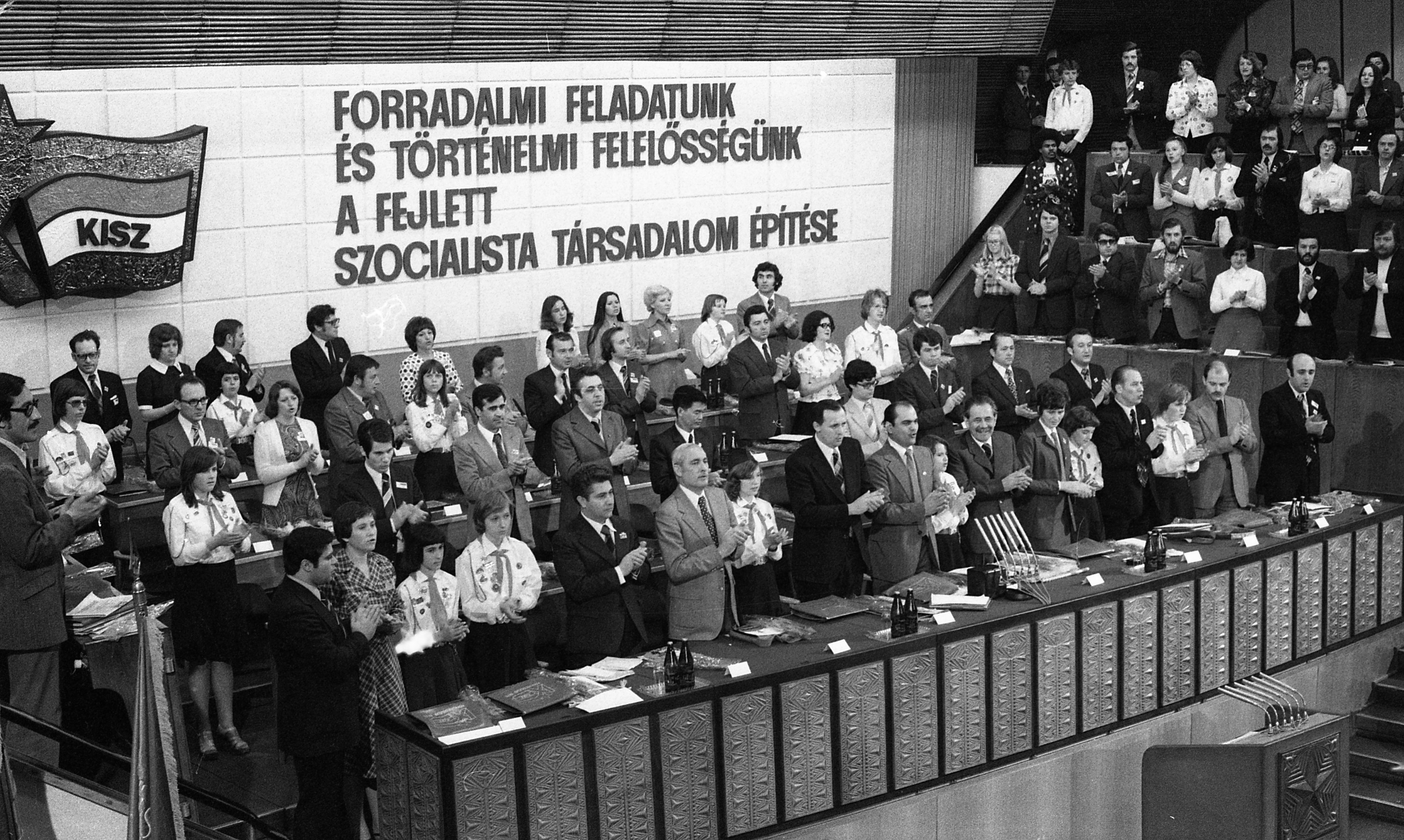 Dózsa György út 84. MÉMOSZ (Magyarországi Építőipari Munkások Országos Szövetsége) székháza, nagyterem, a KISZ IX. Kongresszusa. Az emelvényen az első sorban jobbról az első Barabás János, a második Fejti György, harmadik Grósz Károly, negyedik Szűcs Istvánné, ötödik Aczél György, hetedik Maróthy László, nyolcadik Pullai Árpád. A második sor balszélén Deák Gábor, a harmadik sor közepén Horváth István. Location: Hungary, Budapest VI. Tags: Budapest, congress Title: Dózsa György út 84. MÉMOSZ (Magyarországi Építőipari Munkások Országos Szövetsége) székháza, nagyterem, a KISZ IX. Kongresszusa. Az emelvényen az első sorban jobbról az első Barabás János, a második Fejti György, harmadik Grósz Károly, negyedik Szűcs Istvánné, ötödik Aczél György, hetedik Maróthy László, nyolcadik Pullai Árpád. A második sor balszélén Deák Gábor, a harmadik sor közepén Horváth István.